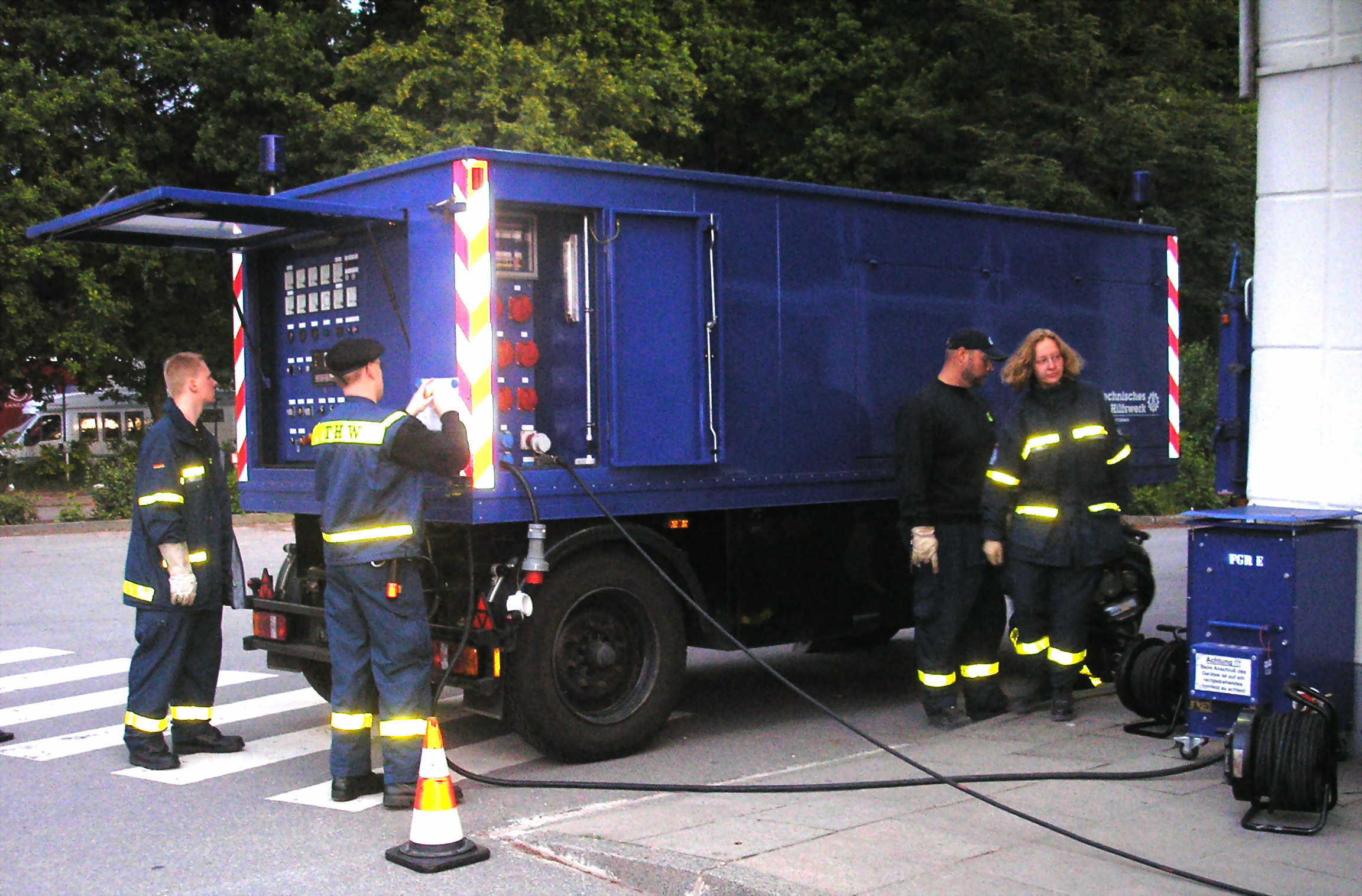 THW NEA – Netzersatzanlage (Stromerzeugungsaggregat) des deutschen Technischen Hilfswerks